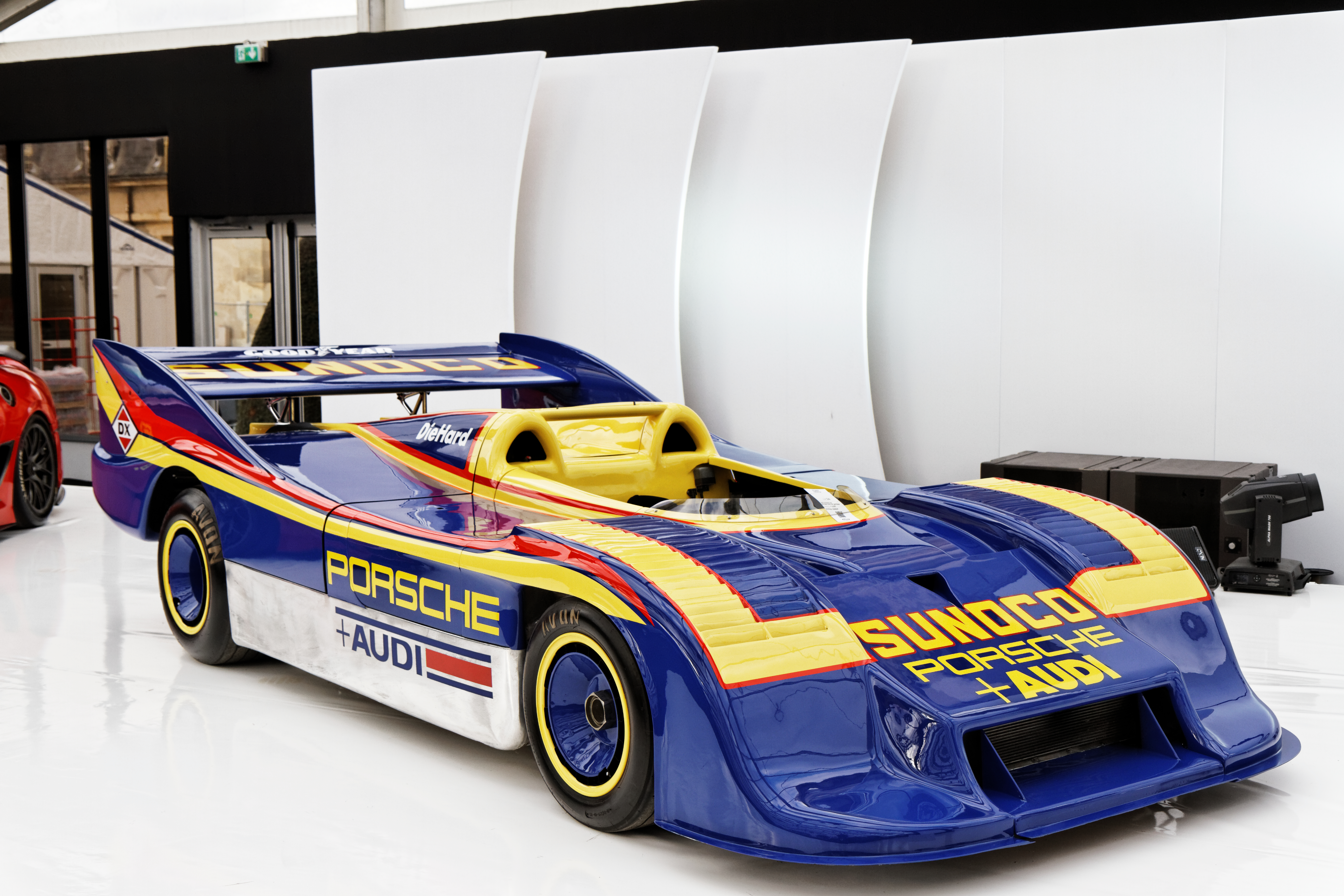 Une Porsche 917-30 CAN-AM Spyder de 1973.